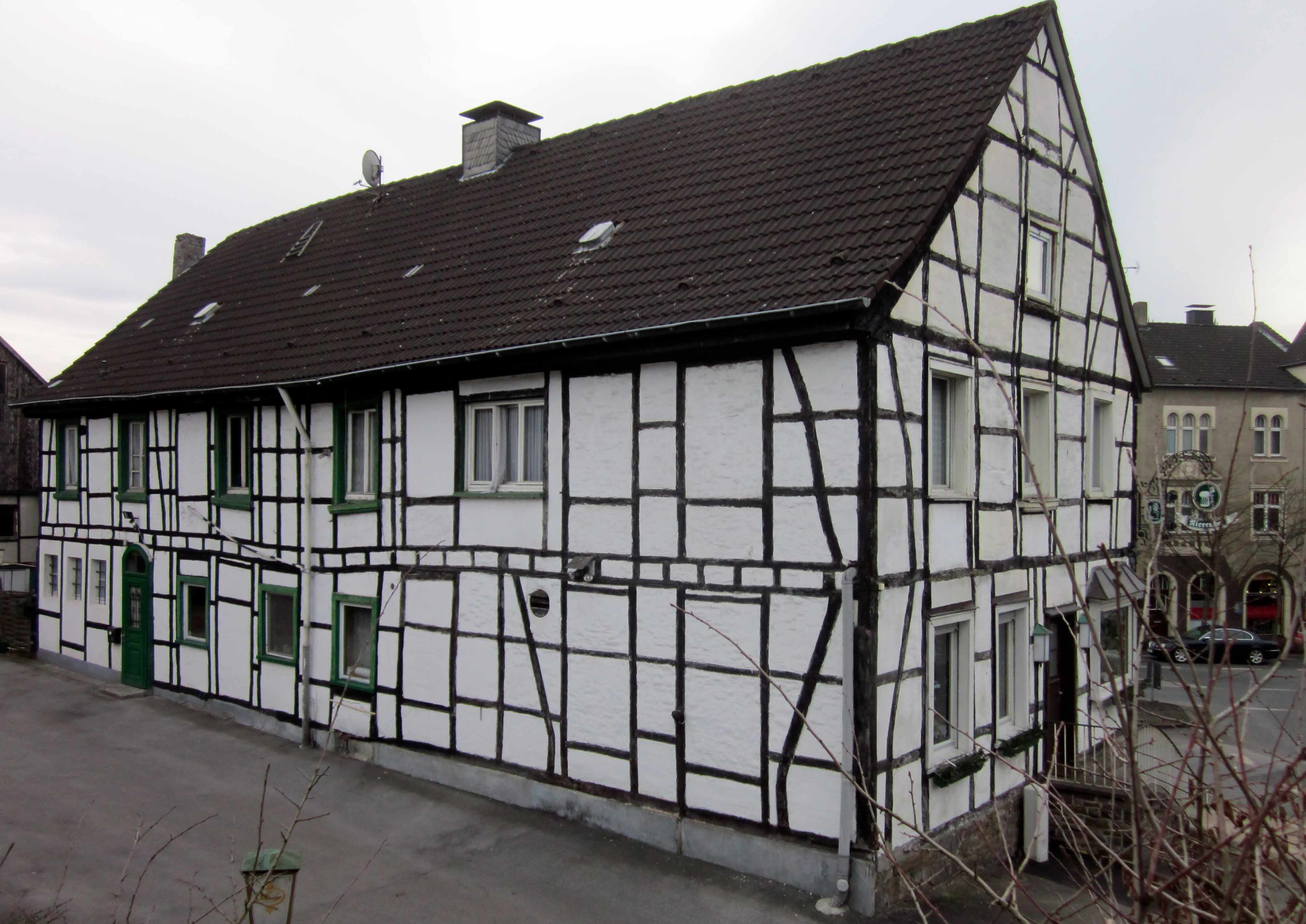 Gasthof Nierenhof (Ostseite) 2013